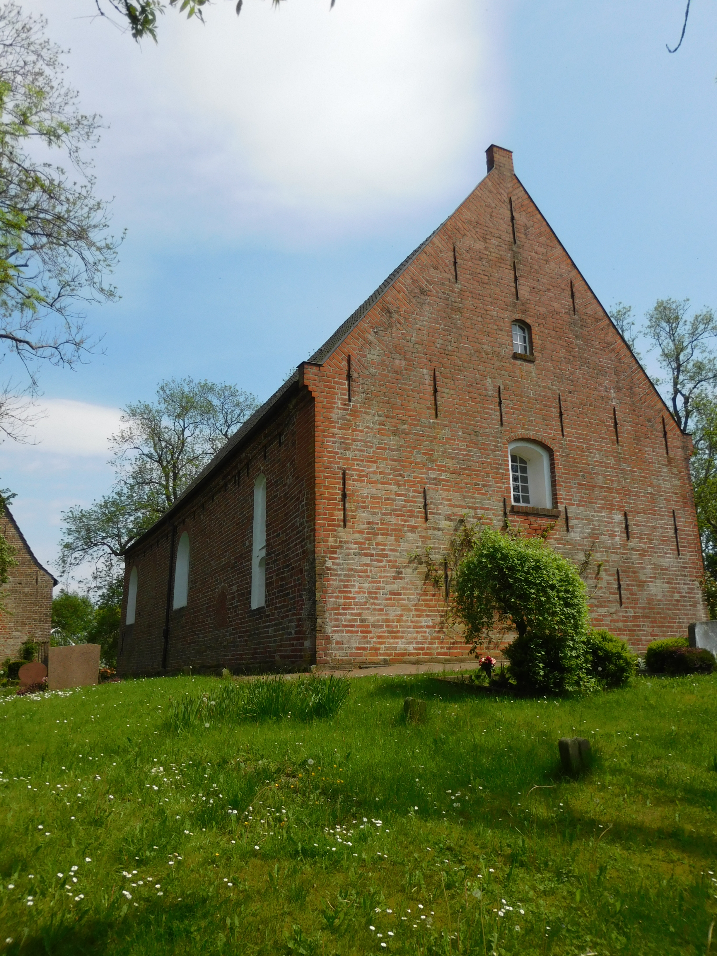 Westgiebel und Nordwand der evangelisch-lutherischen Kirche Wüppels